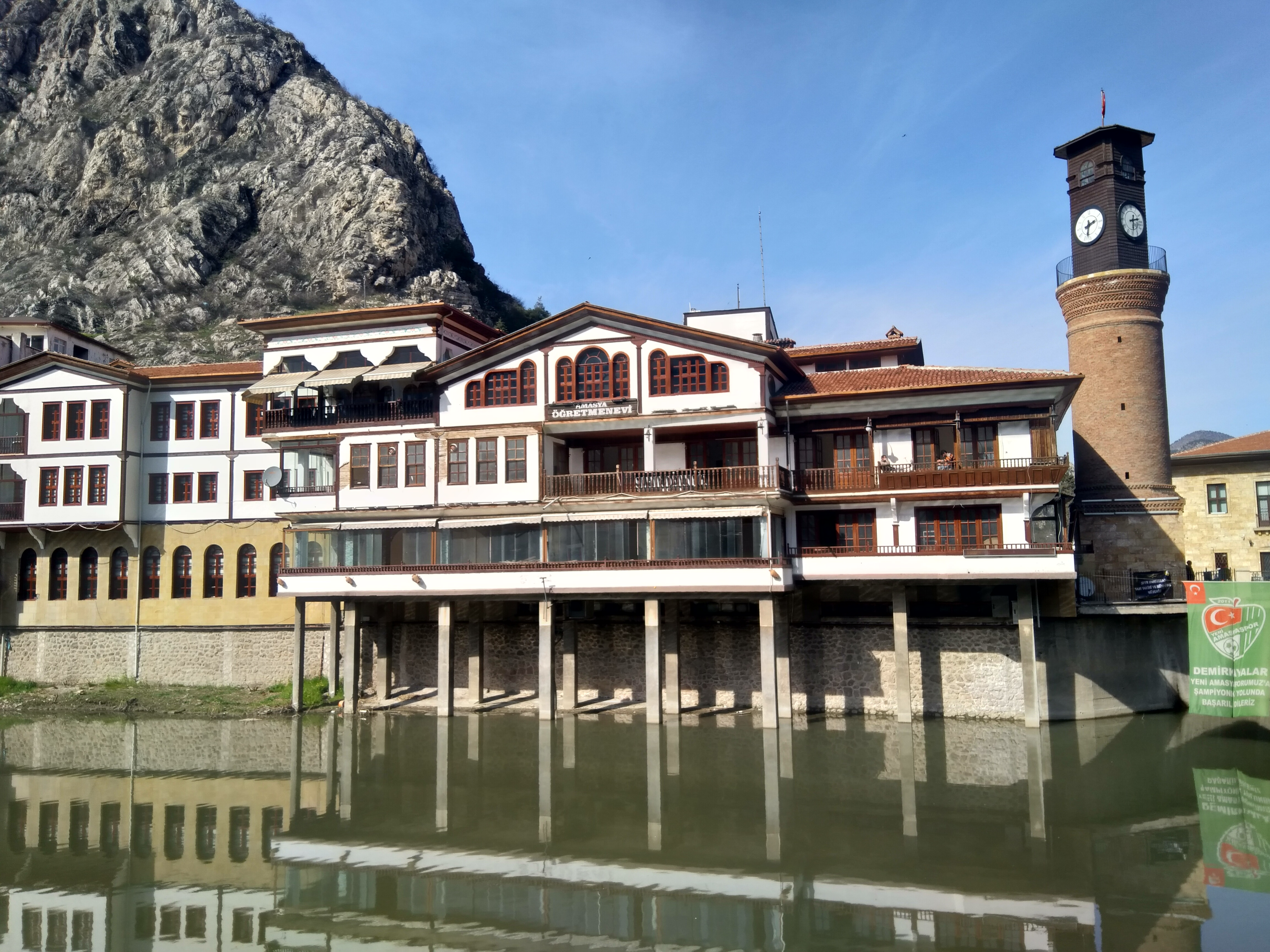 Amasya Saat Kulesi'nden ve Amasya Öğretmenevi'nden bir görünüm.